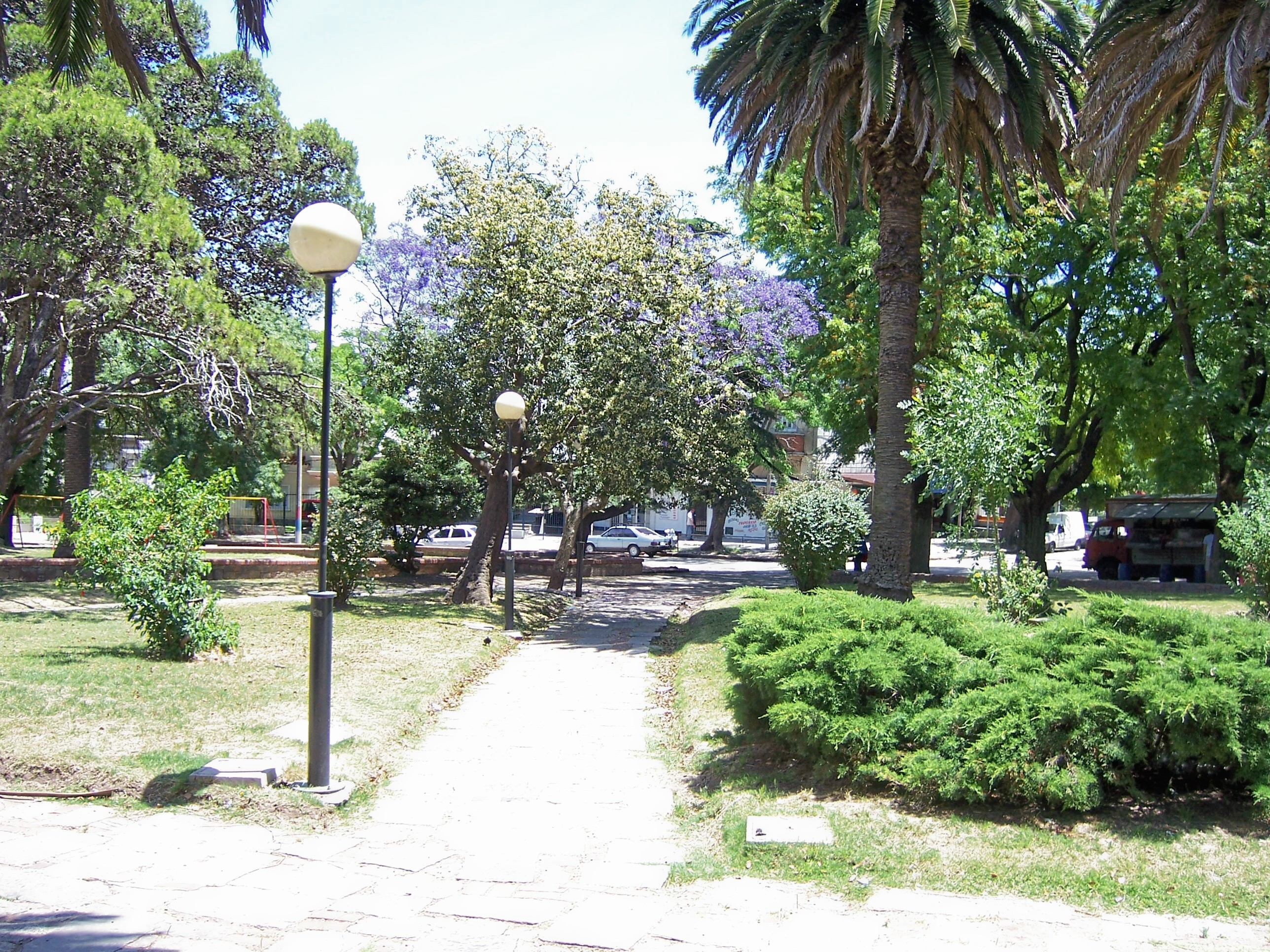 Plaza de los Olímpicos, Montevideo, Uruguay.